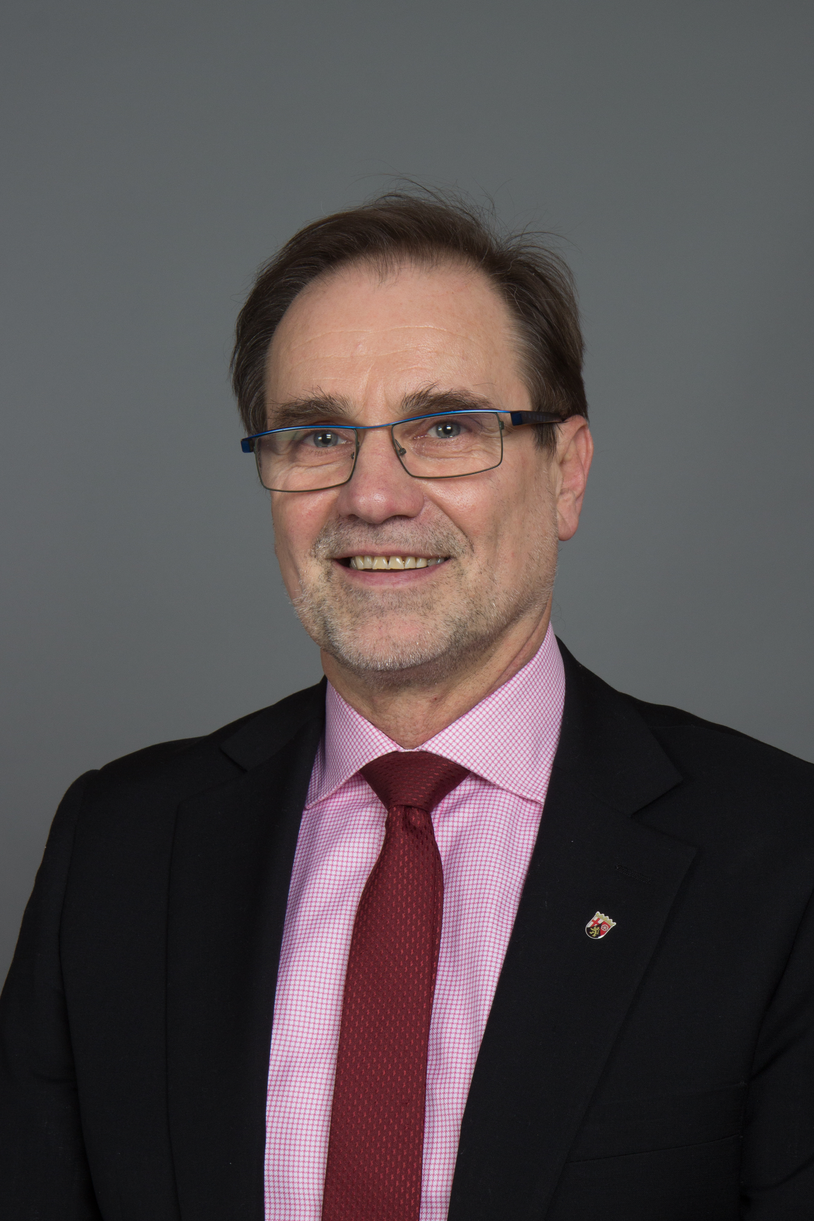 Wolfgang Schwarz (Politiker)Landtagsabgeordneter im Landtag Rheinland-Pfalz